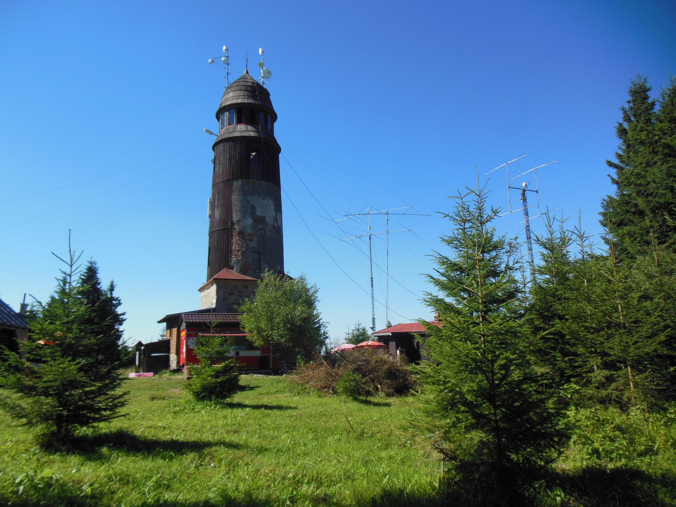 Rozhledna na Blatenském vrchu u Horní Blatné (okres Karlovy Vary).